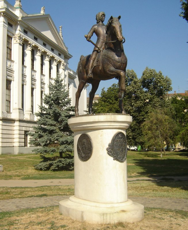 Hunyadiak szobra Szegeden a Tisza partján, a Móra Ferenc Múzeum mögött (a lovon Mátyás király). Lapis András alkotása